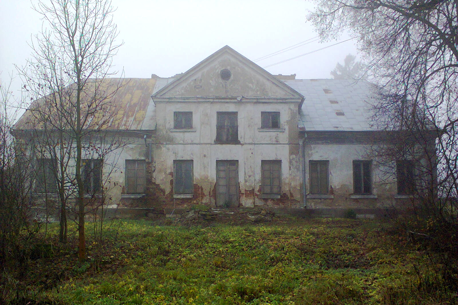 Dwór Dobrzyckich w Romanach (powiat kolneński)